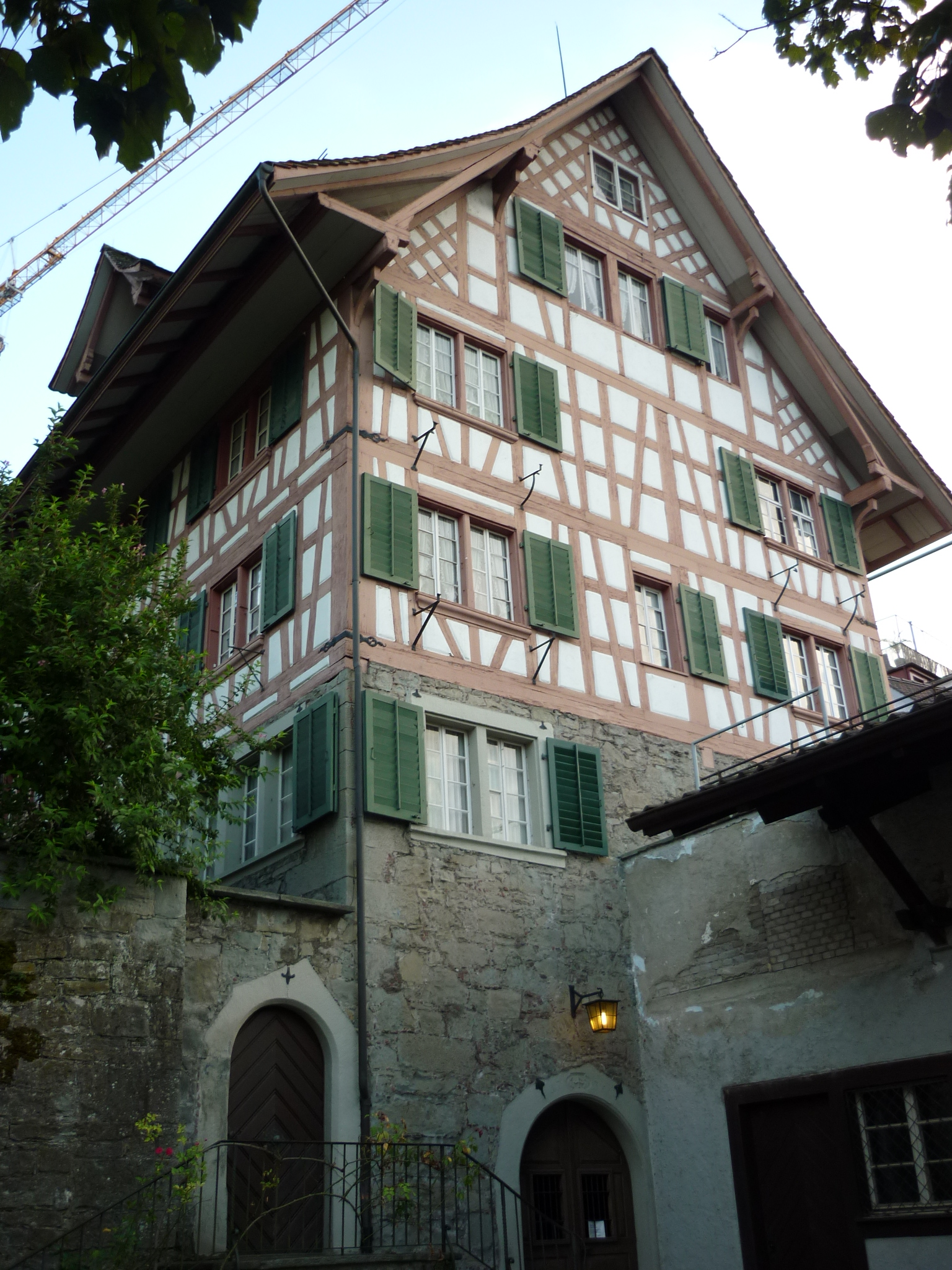 Untervogthaus, Horgen ZH, Schweiz